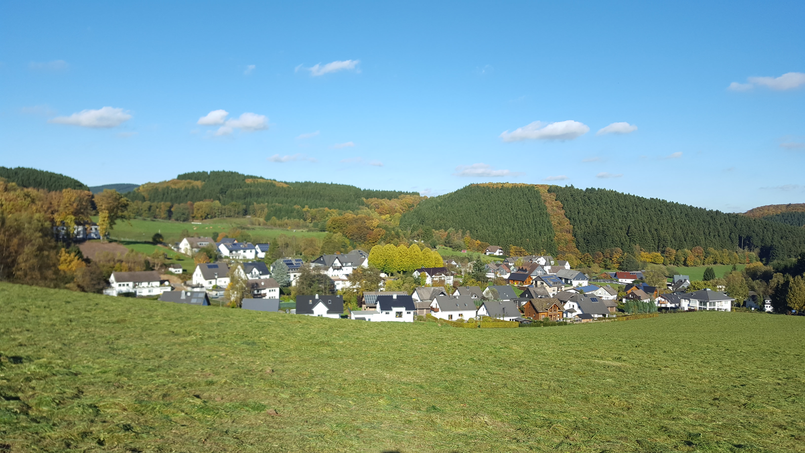 Dieses Bild zeigt das Ober- und Unterdorf von Hülschotten aus südlicher Richtung.